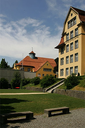 Biel/Bienne: Gymnasium Alpenstrasse